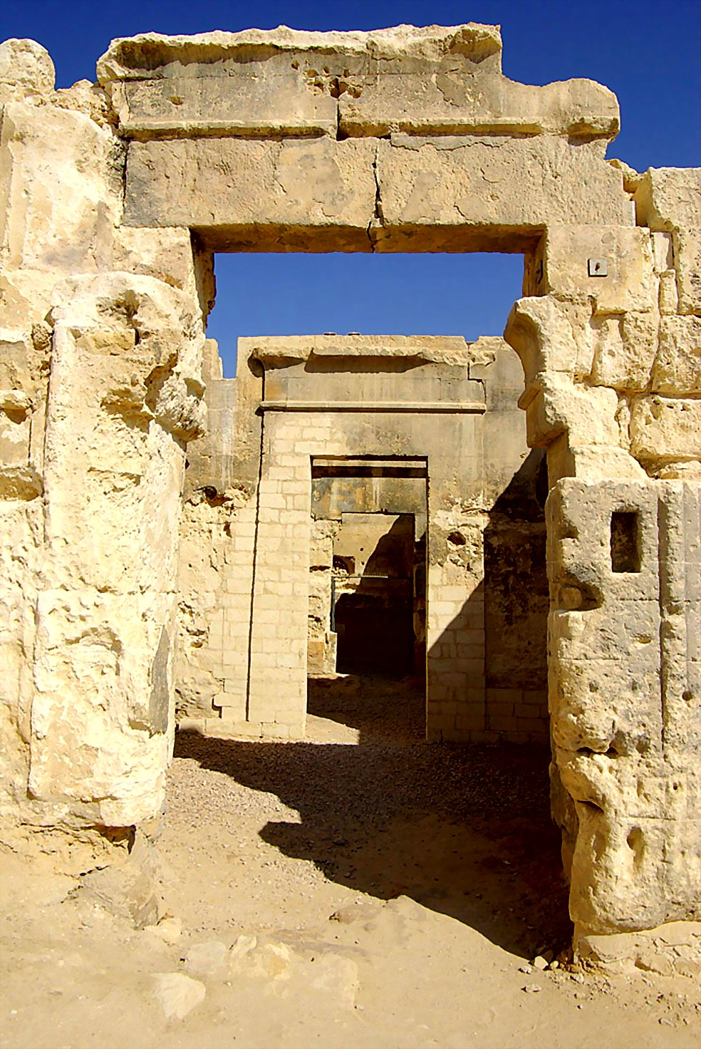 le Temple d'Oracle